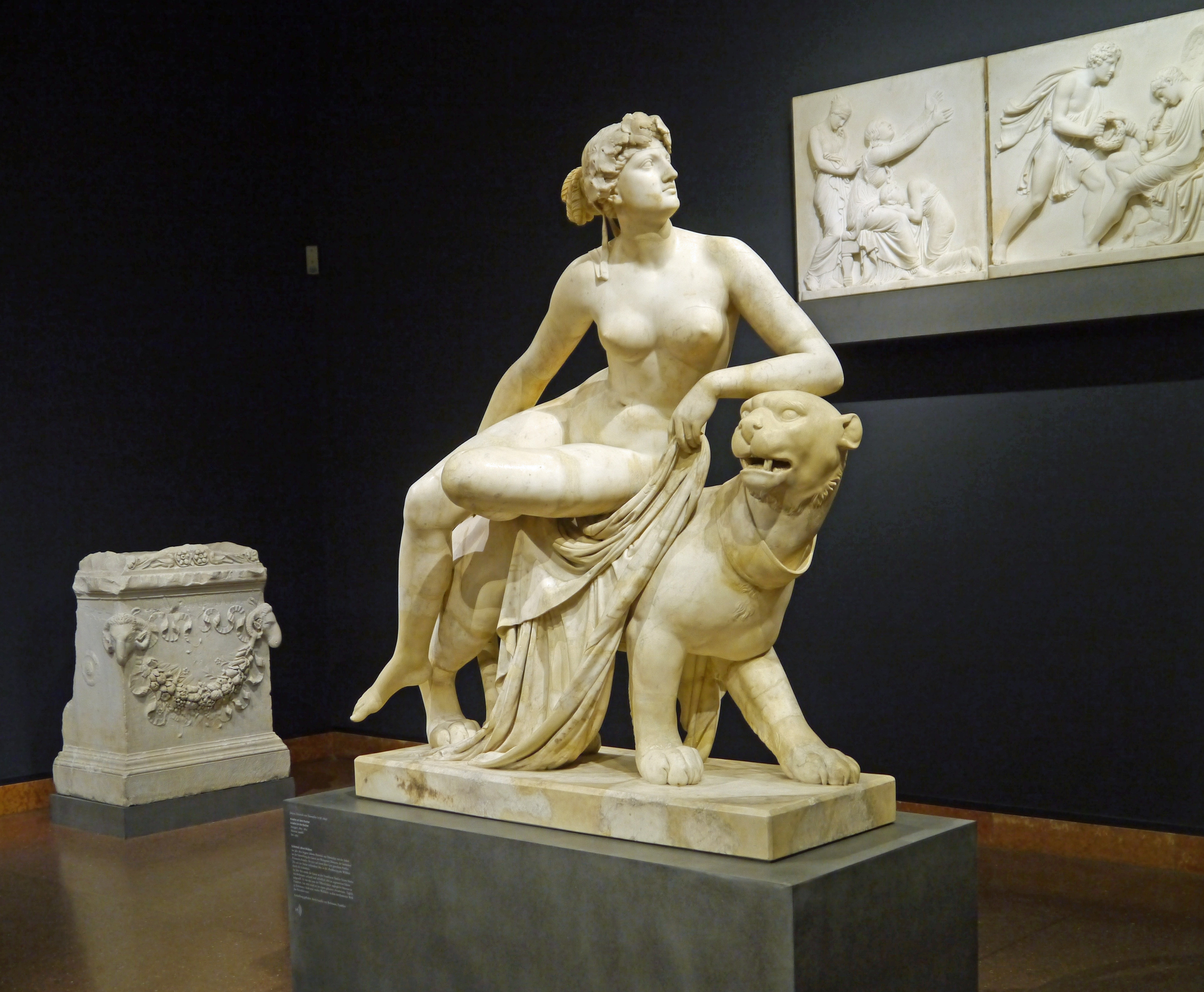 Johann Heinrich von Dannecker, Ariadne auf dem Panther, 1803-1814, im Liebieghaus in Frankfurt am Main.